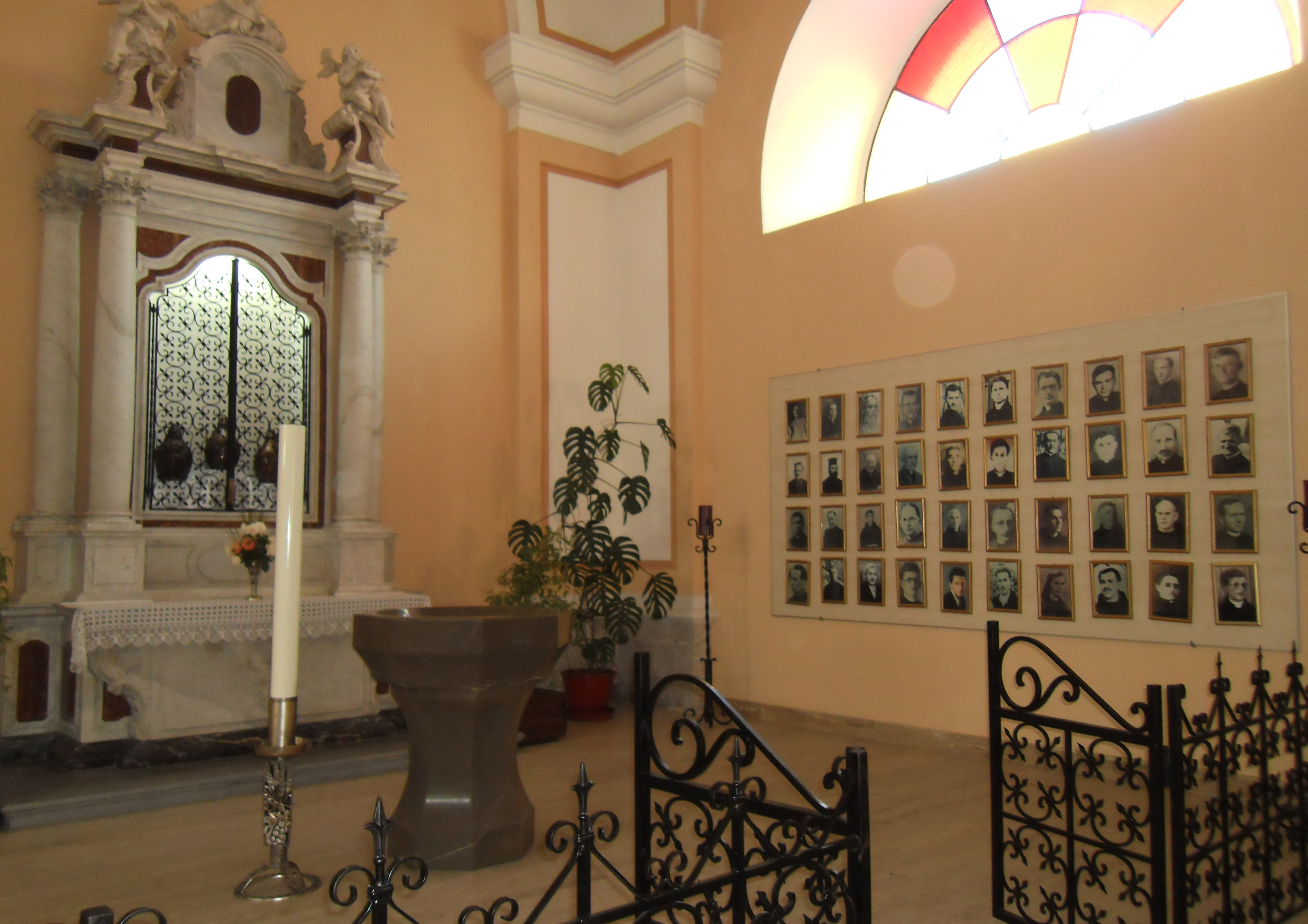 Seitenaltar in der Kathedrale von Shkodra mit Fotos der im Kommunismus ermordeten Priester